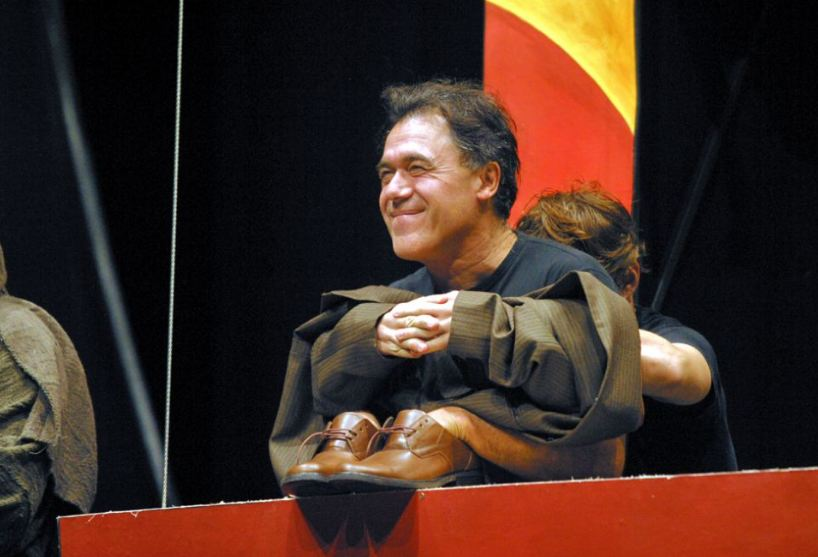 Gáspár Sándor (Szentes, 1956. április 9. –) Kossuth-díjas és Jászai Mari-díjas magyar színész, érdemes művész.